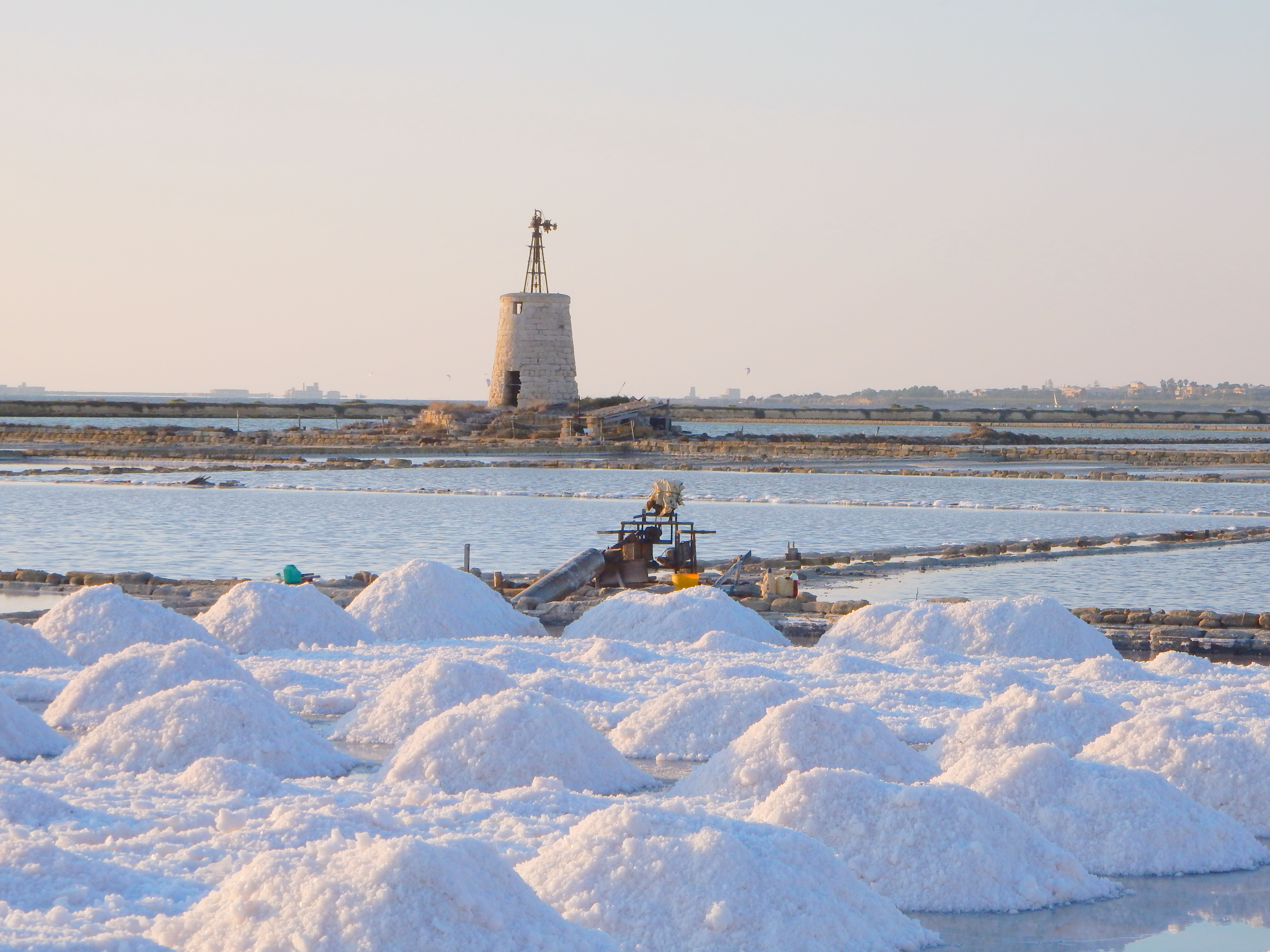 un momento di vita presso le saline di trapani